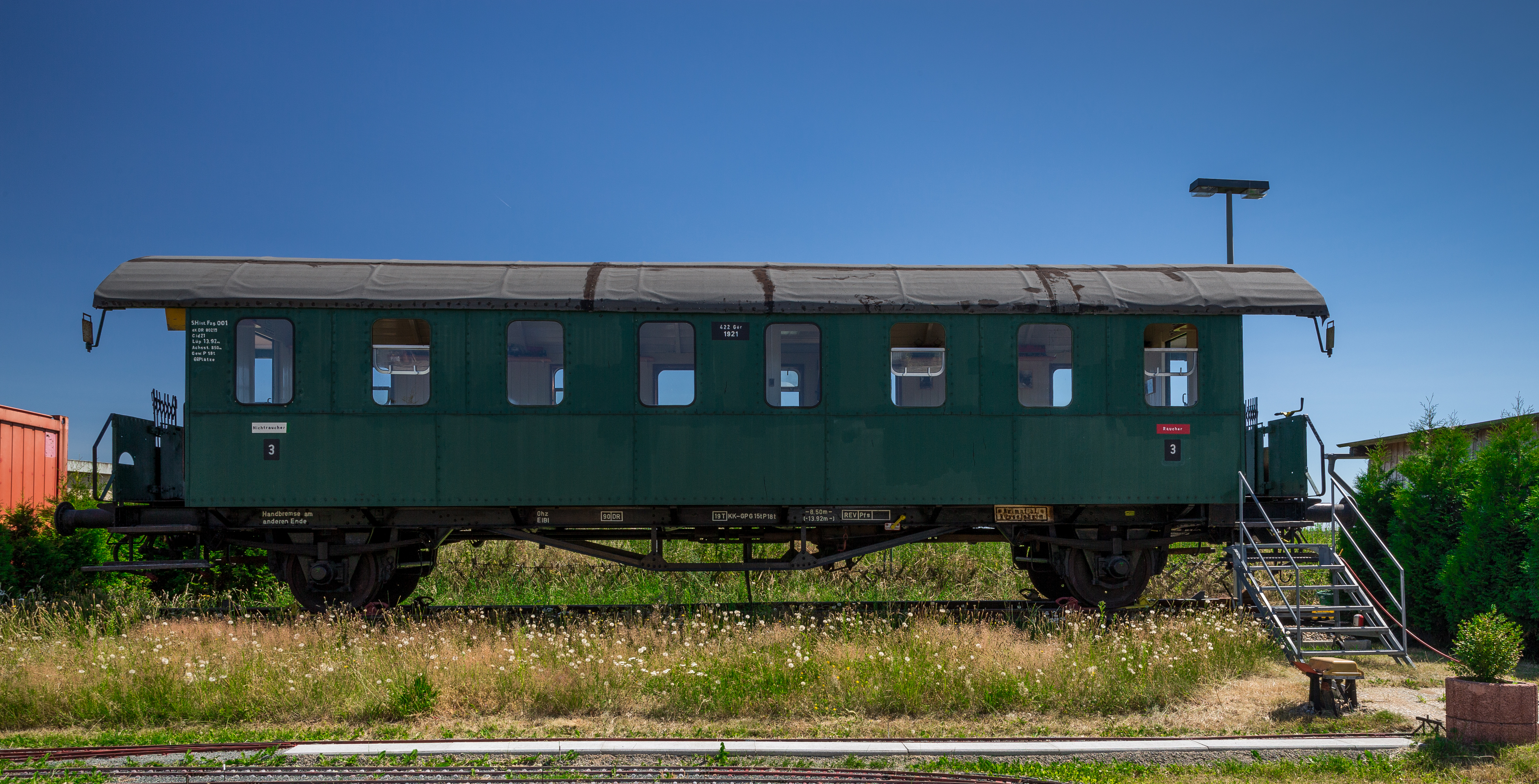 Frontalansicht Zweiachsiger Durchgangs-Personenwagen Di-21.